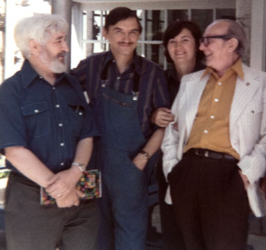 Jacques Hnizdovsky, Lubomyr Hutsaliuk, Stephanie Hnizdovsky and Edward Kozak at Soyuzivka